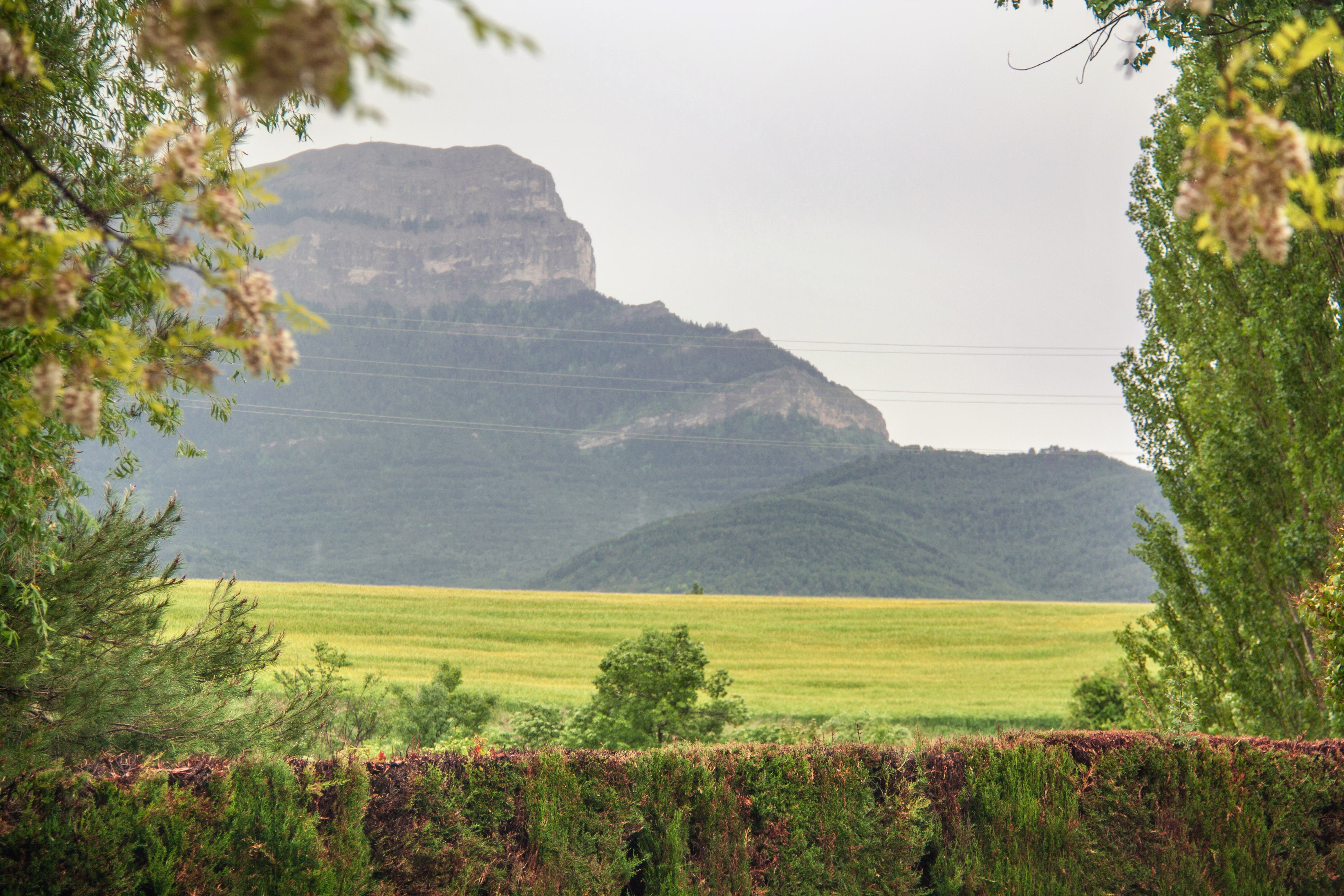 Castiello de Jaca, España